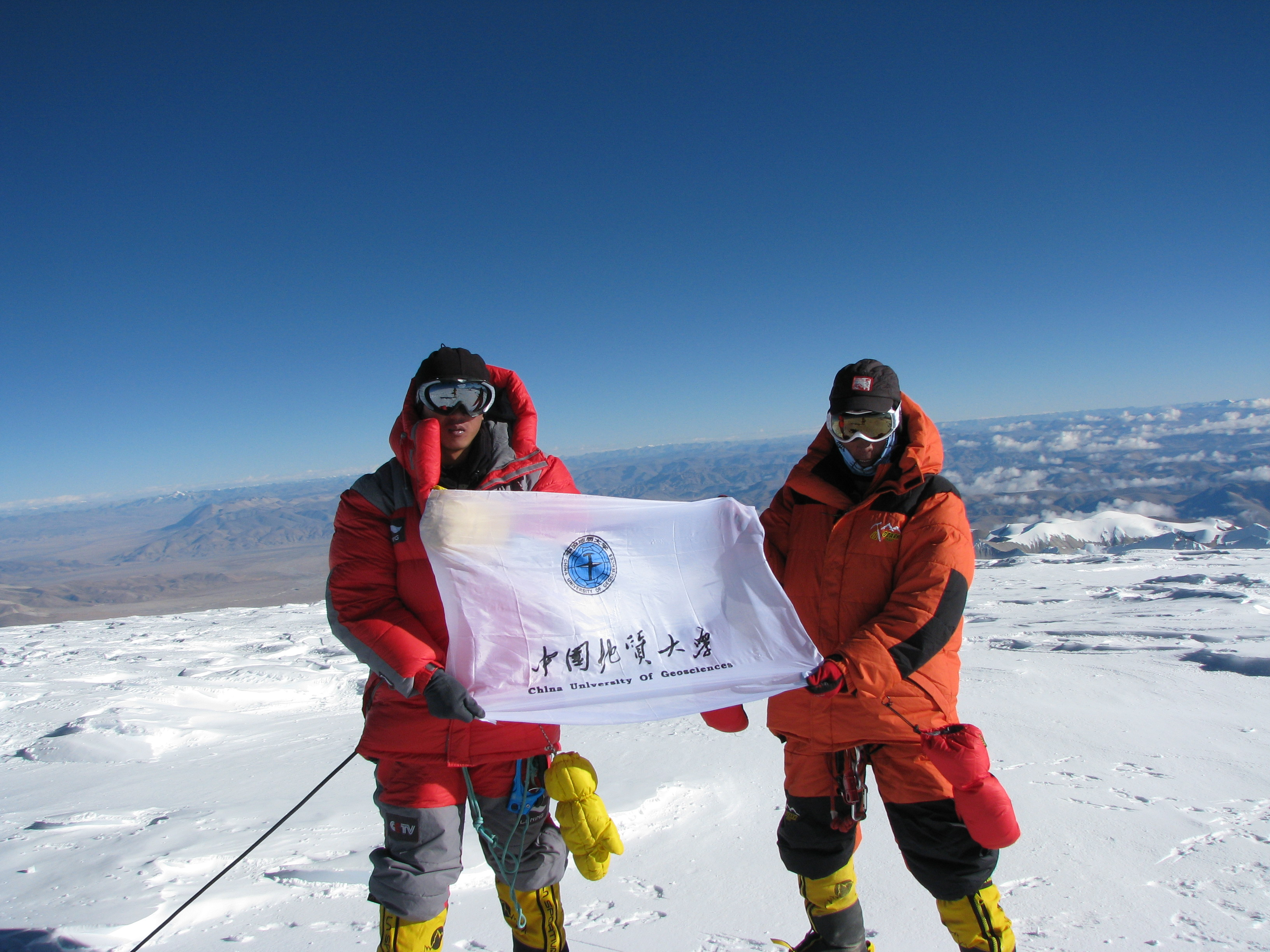 2008年10月2日，中国地质大学（武汉）登山队登顶卓奥友峰